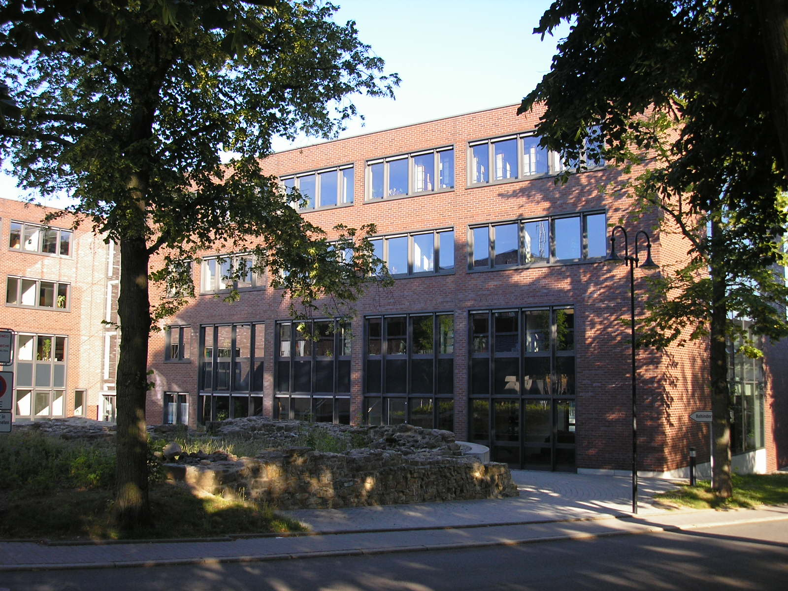 Westflügel des Finanzamts in Ilmenau (Thüringen), im Vordergrund die Grundmauern der ehem. Wasserburg.